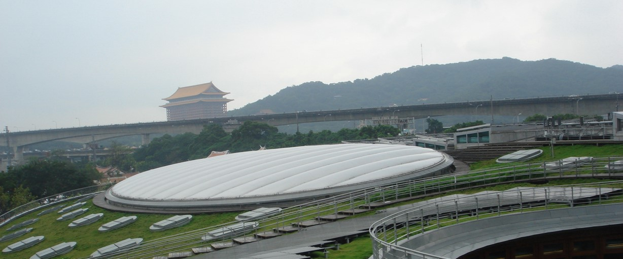 2010年台北國際花卉博覽會-未來生活館ETFE屋頂，為台灣首座充氣式ETFE膜結構